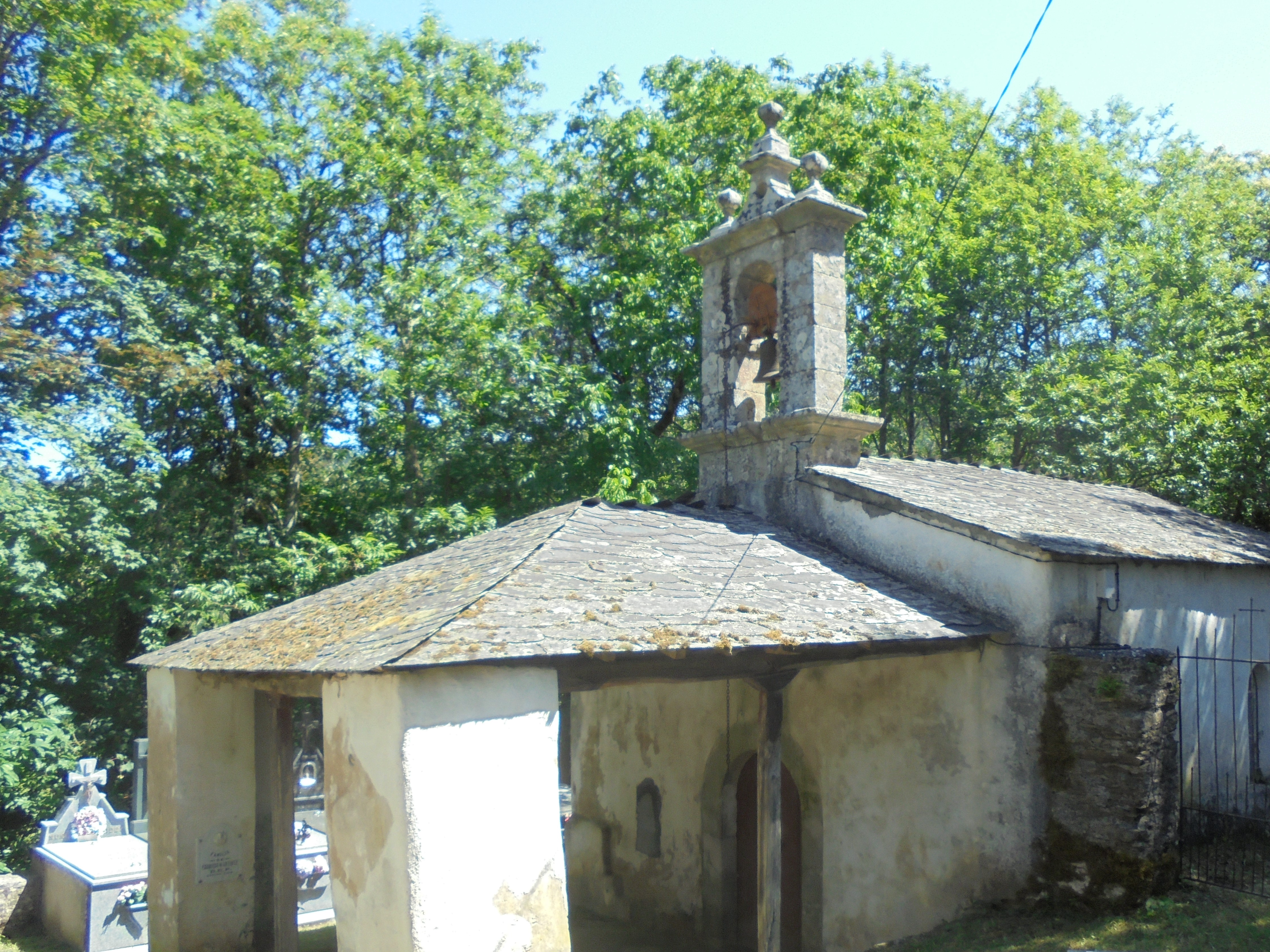 Igrexa de Santa María de Vilachambre